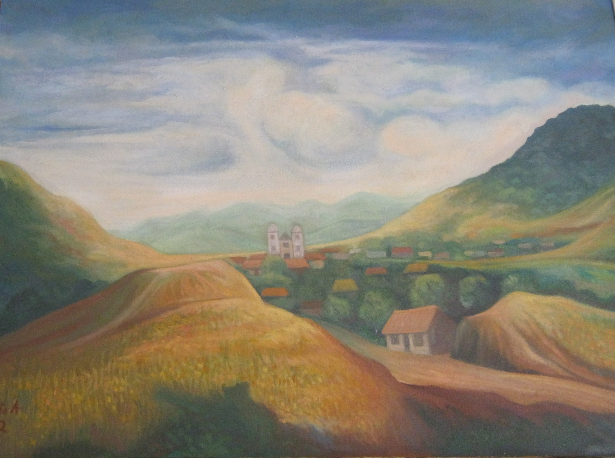 paisaje de tecalitlan , jalisco